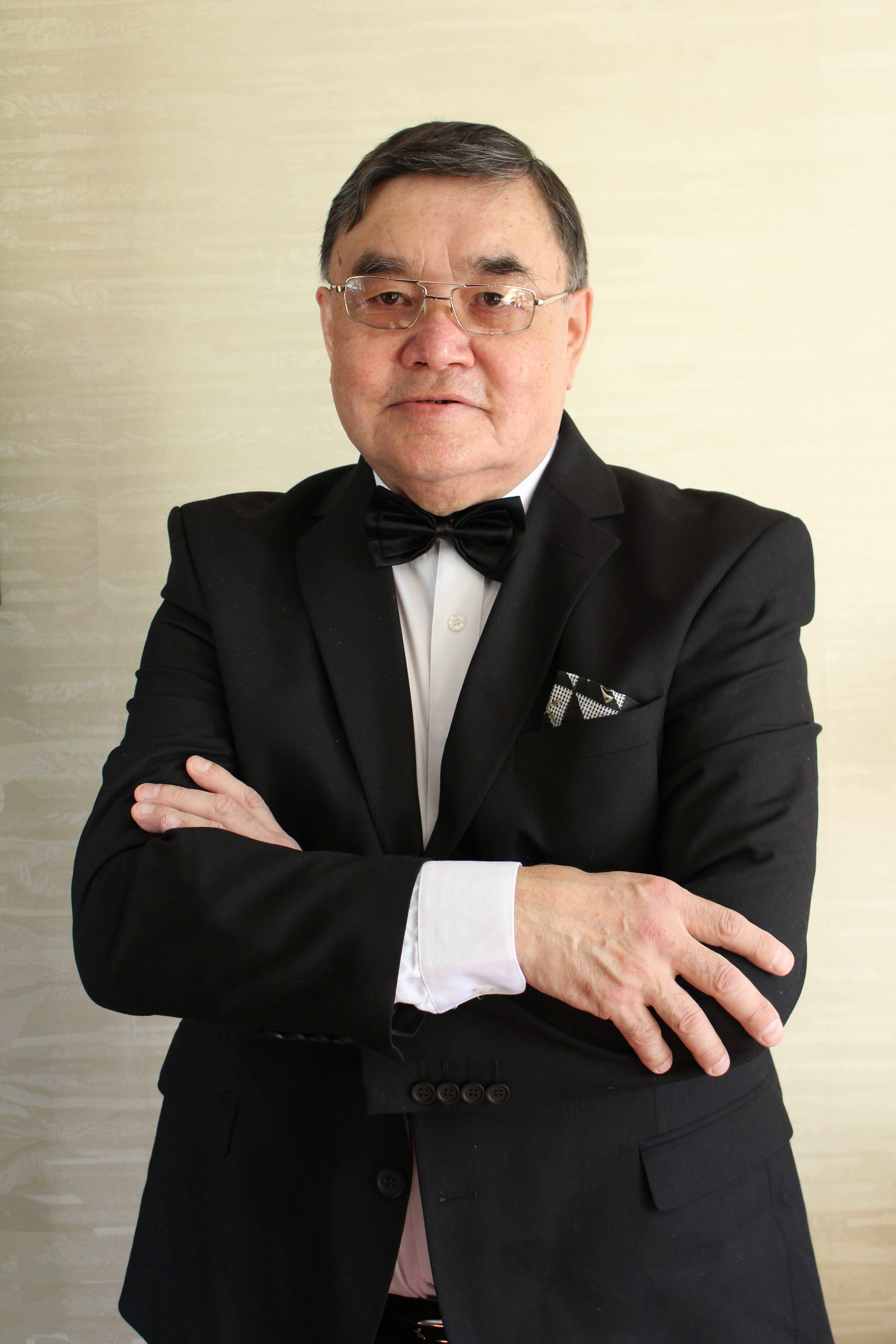 Нурлан Измаилов